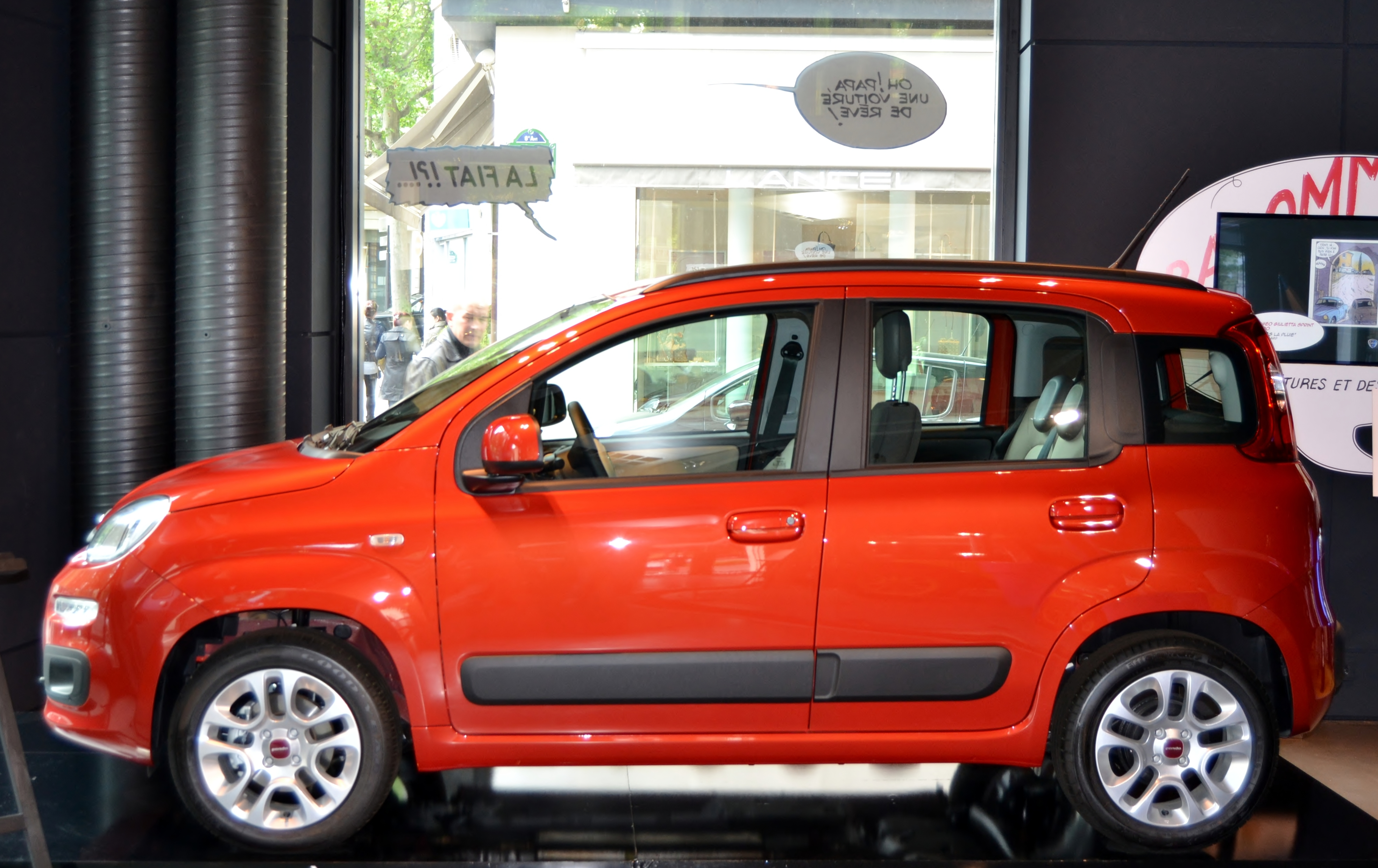 Fiat Panda 2012 - Vista lateral